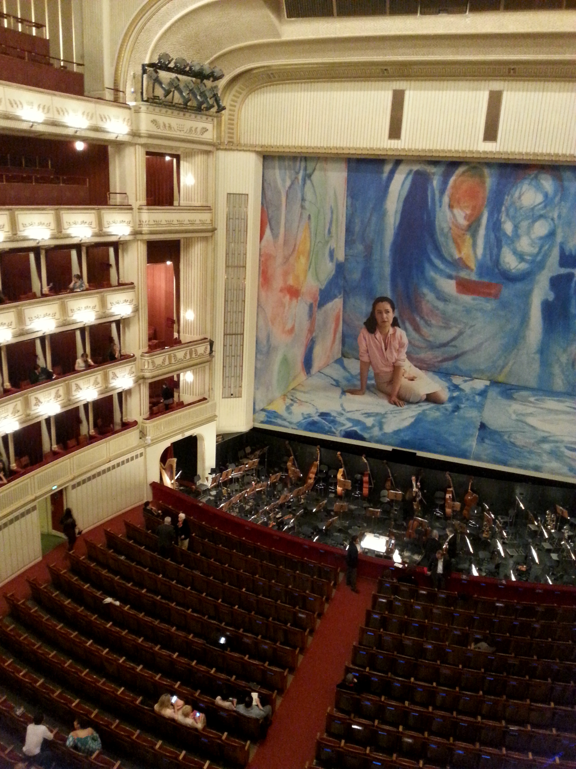 Vista de la boca de escena y el foso de la Wiener Staatsoper, con la decoración del Telón Antiincendios por Dominique Gonzalez-Foerster